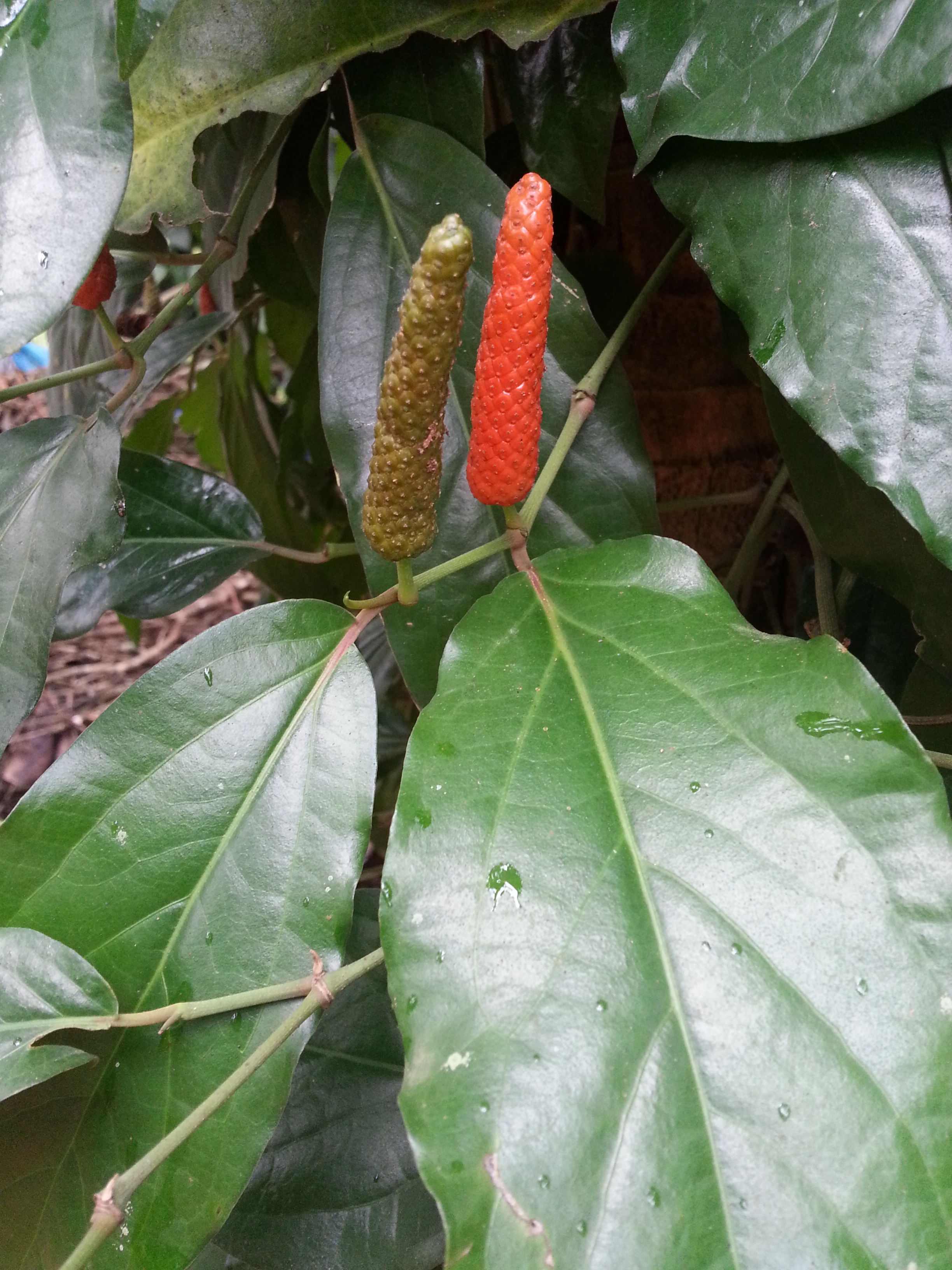 ഔഷധസസ്യമായ തിപ്പലിയുടെ തിരി .ഇത്‌ ഉണക്കിയത്‌ അങ്ങാടിമരുന്ന് കടയിൽ കിട്ടും.